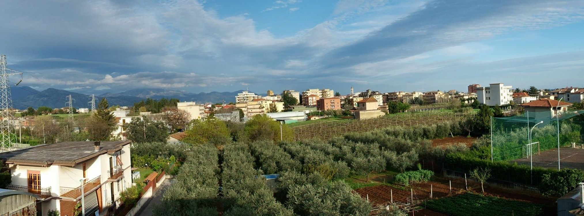 L'ho scattata io.